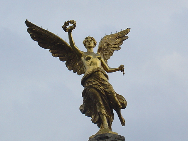 Ángel de la Independencia, Mexico City